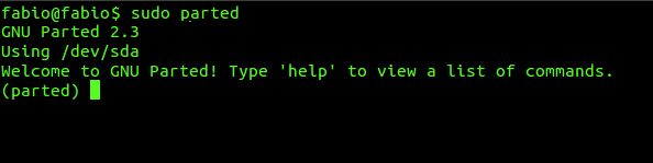 Parted Command